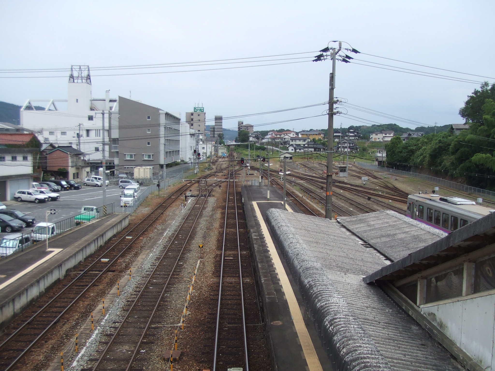 三次駅 駅構内の様子